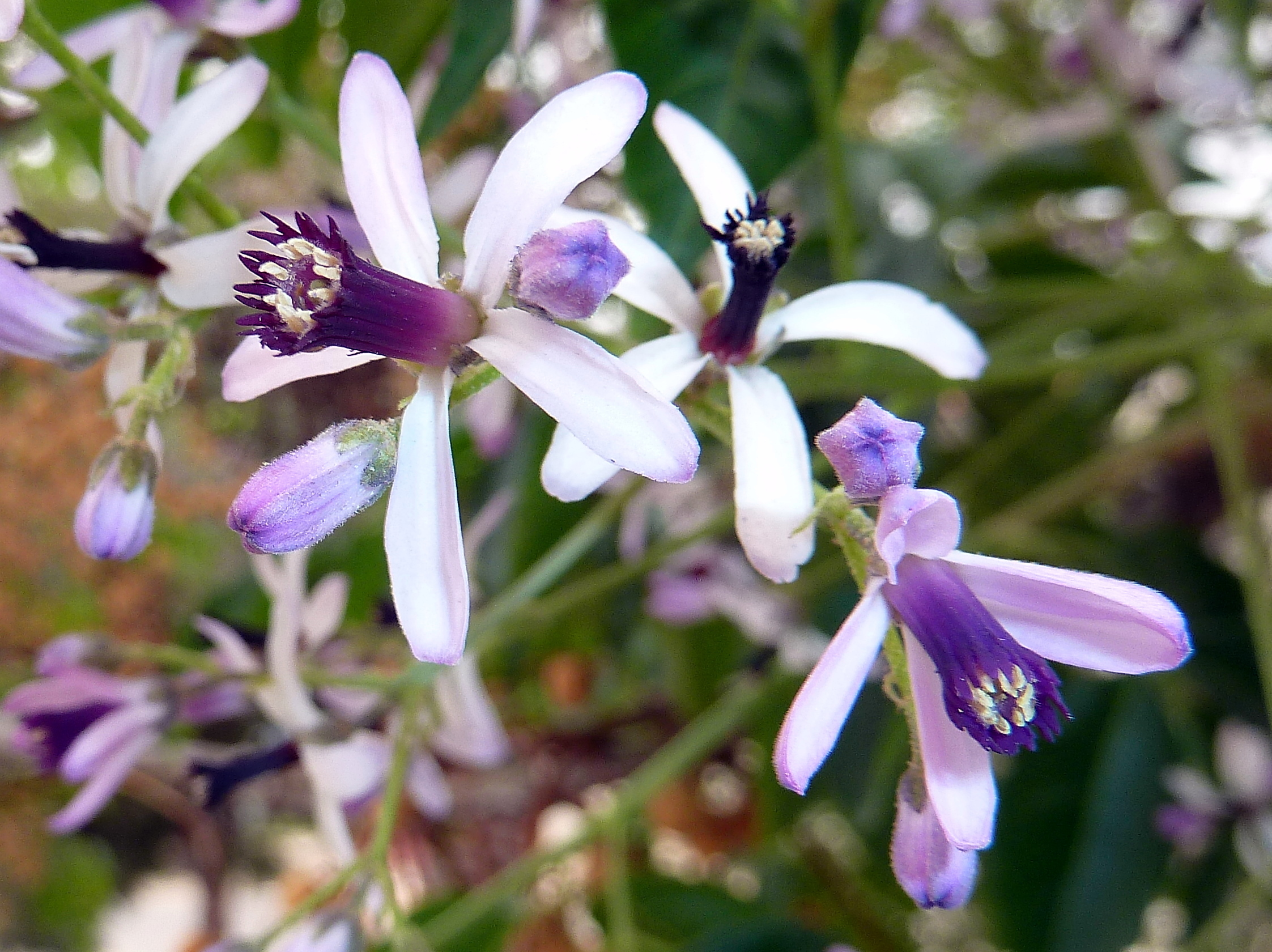 Melia azedarach (cinamomo) - Flores. Cultivado/ornamental, Ronda de la Estación, San Isidro de Albatera (Provincia de Alicante, España).